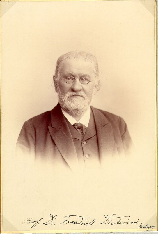 Der Berliner Orientalist Friedrich Heinrich Dieterici (1821-1903)